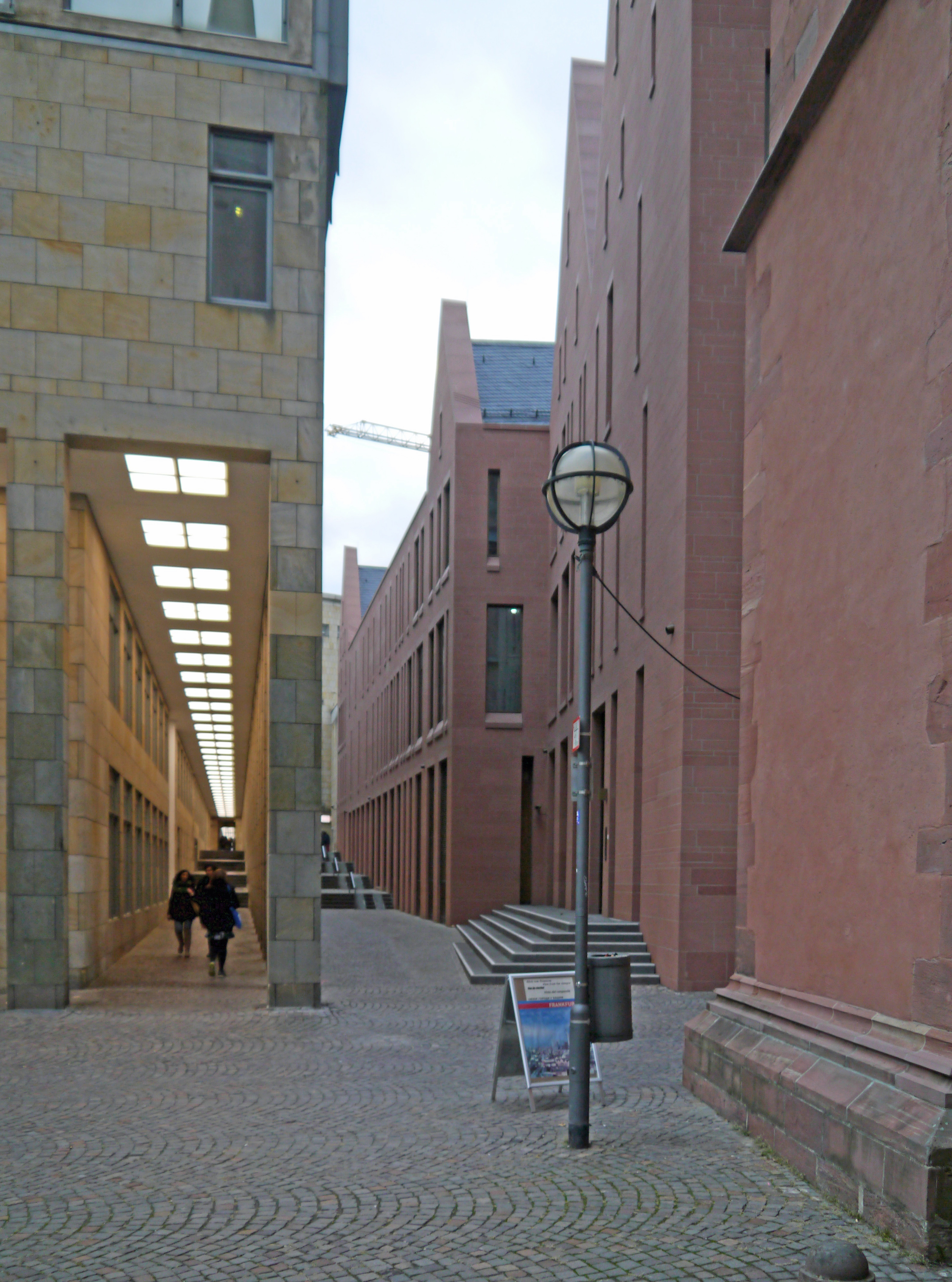 Blick vom Weckmarkt am Dom (2016), durch die Bendergasse nach Westen. Links die Schirn, rechts das Stadthaus.